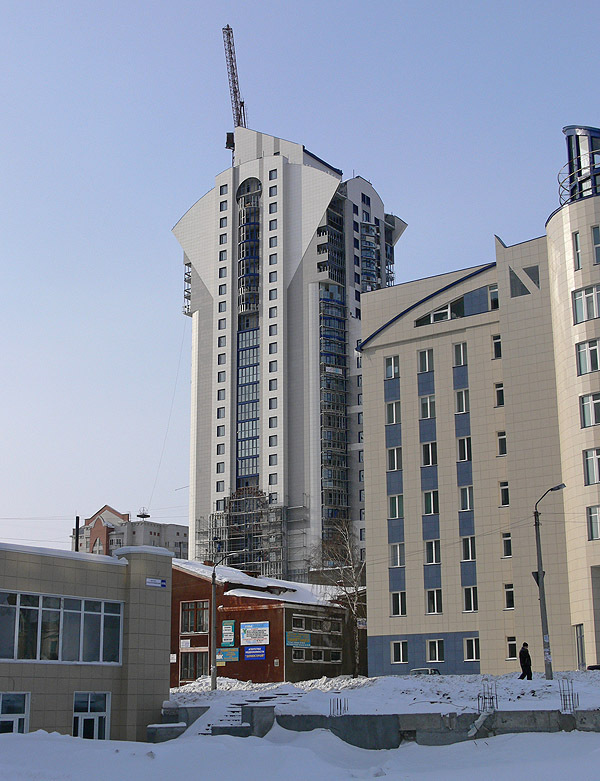 Anastasia complex is under construction